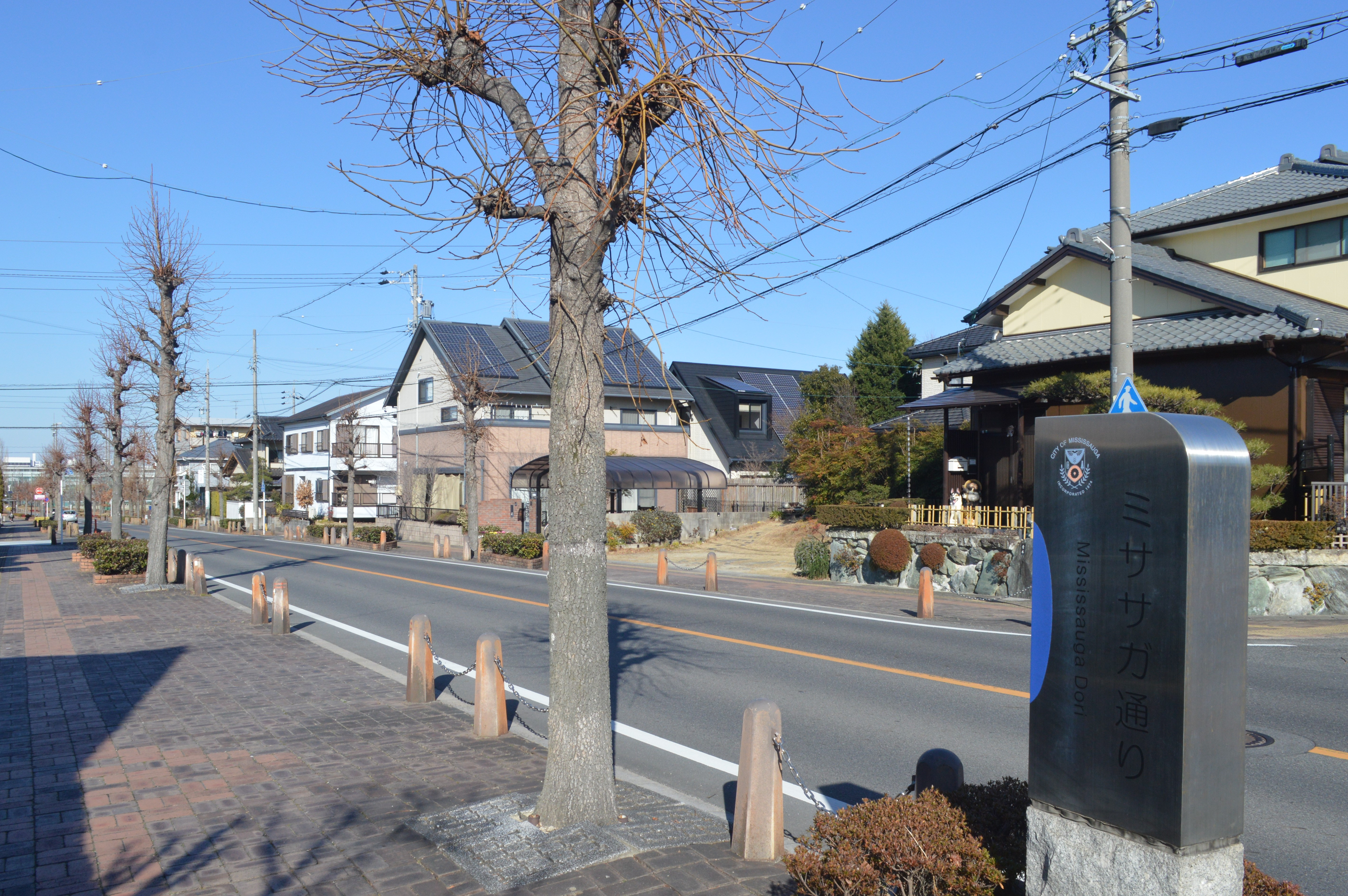 愛知県刈谷市にあるミササガ通り。ミササガパークなどに続いている。